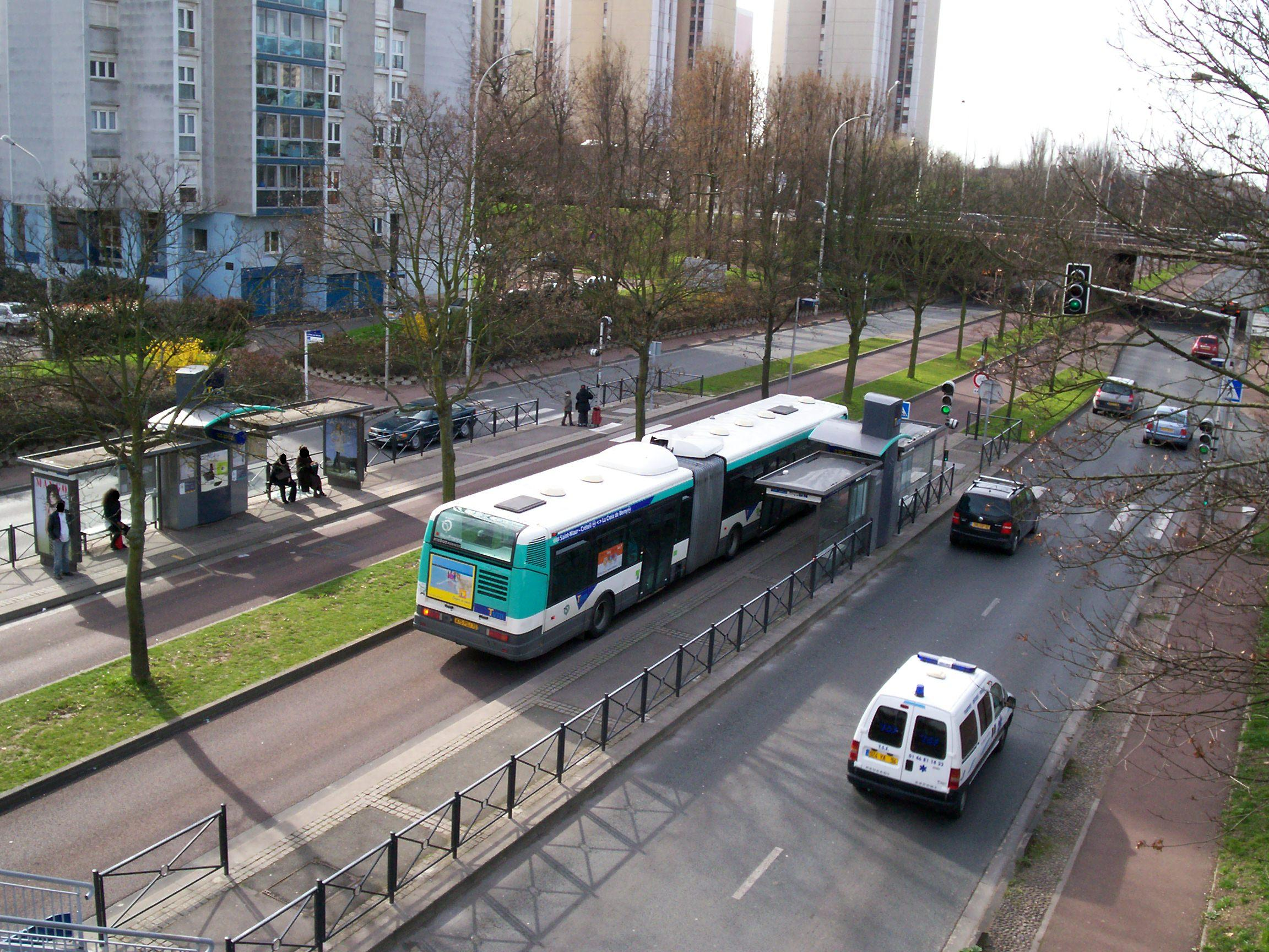 Toujours, le même bus à la Haye aux Moines. Autre vue plus générale de la station